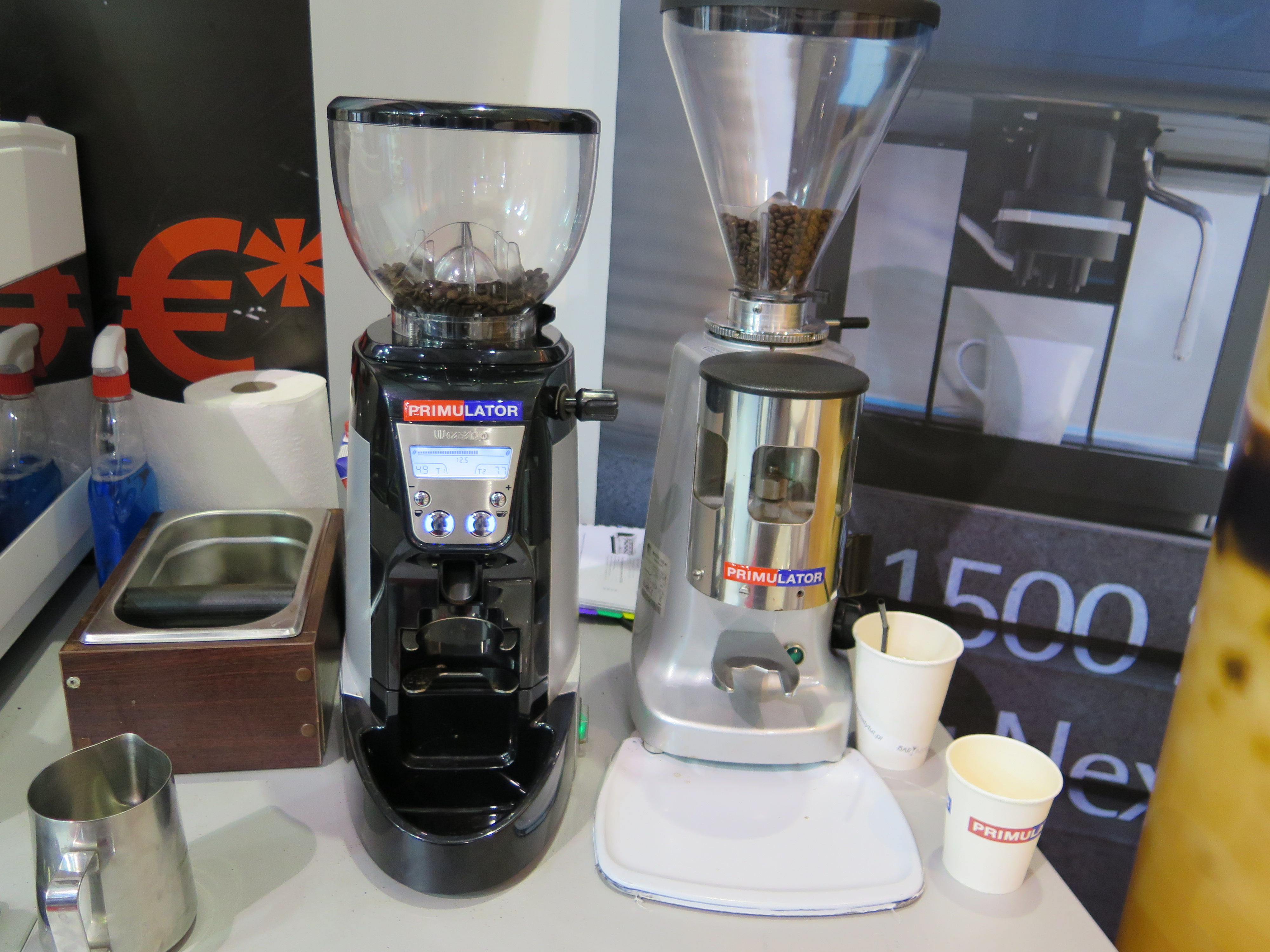 Młynki do kawy podczas HORECA 2014 w Krakowie